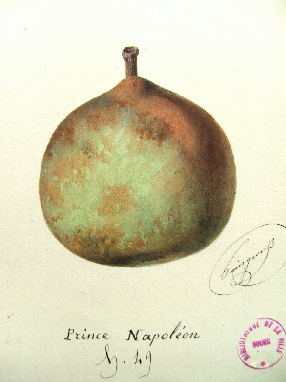 Prince Napoléon, Alphonse Mas, 1875.